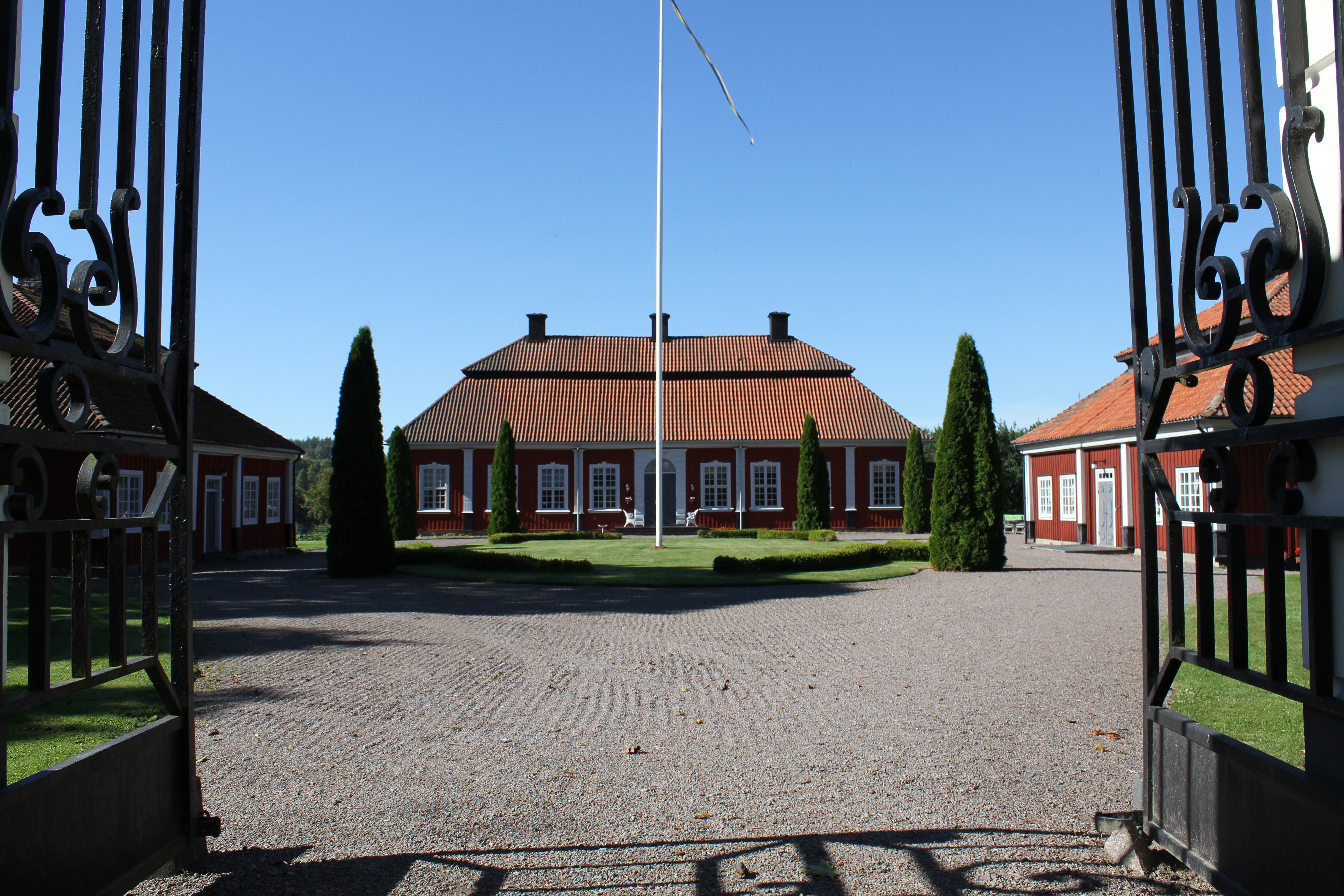 Mangårdsbyggnad